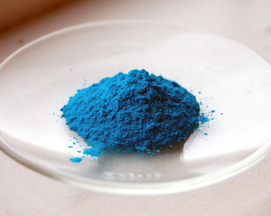 Copper Aspirinate powder